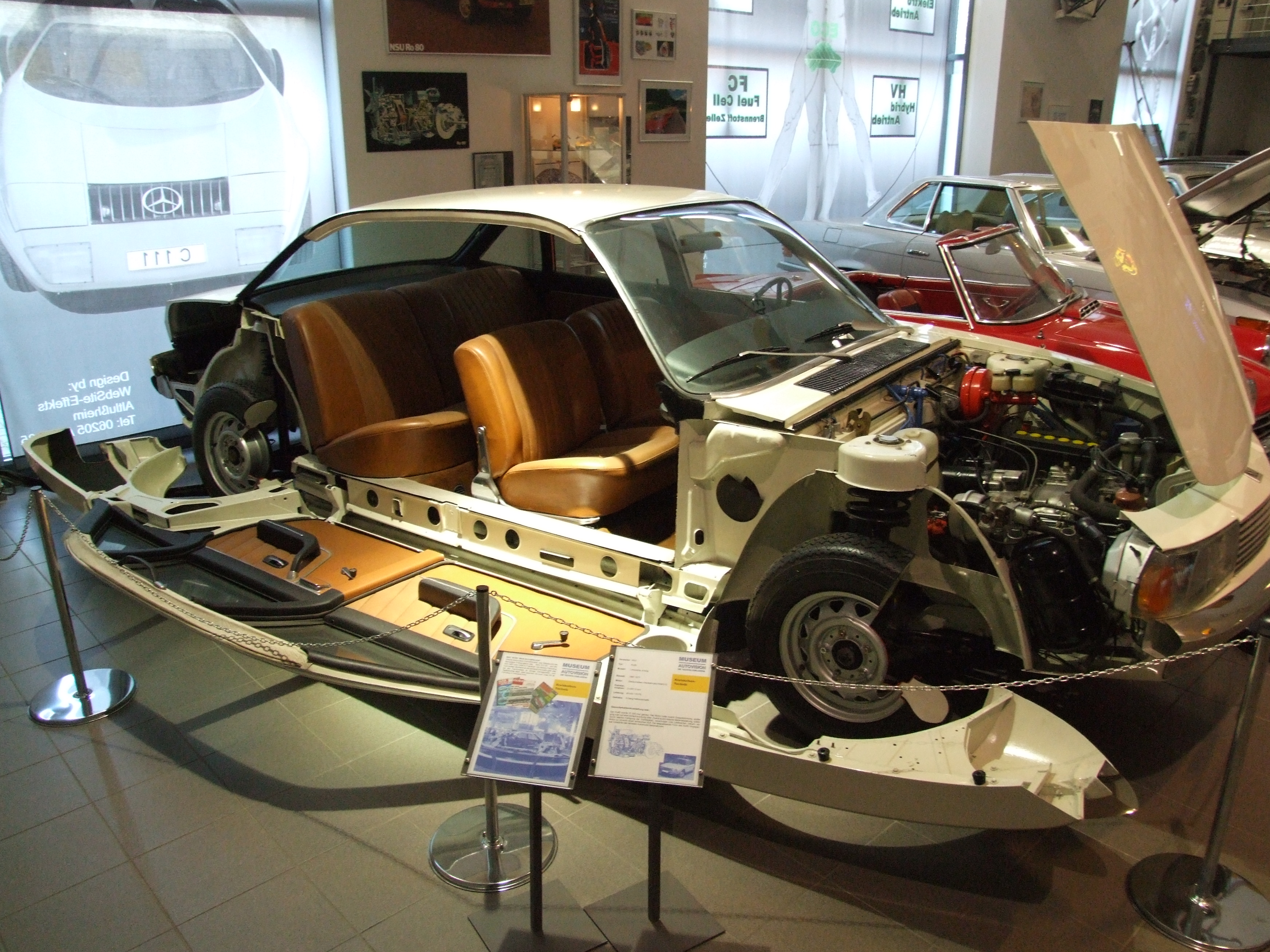 Schnittmodell des NSU Ro 80, mit dem NSU das Fahrzeug auf der IAA vorstellte. Museum Autovision, Altlußheim, Germany, cutaway model of NSU Ro 80